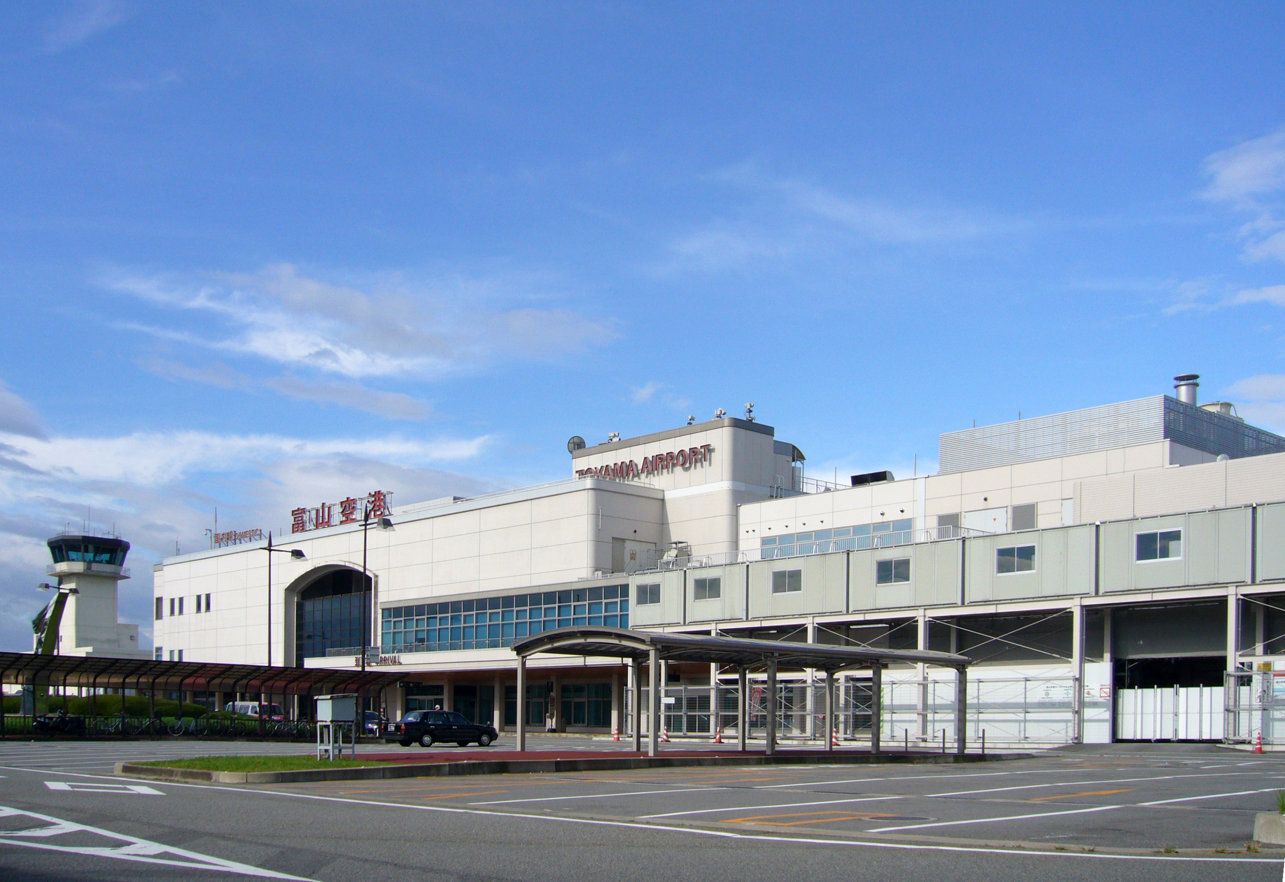 Toyama Airport in Toyama, Japan 富山空港（富山県富山市）